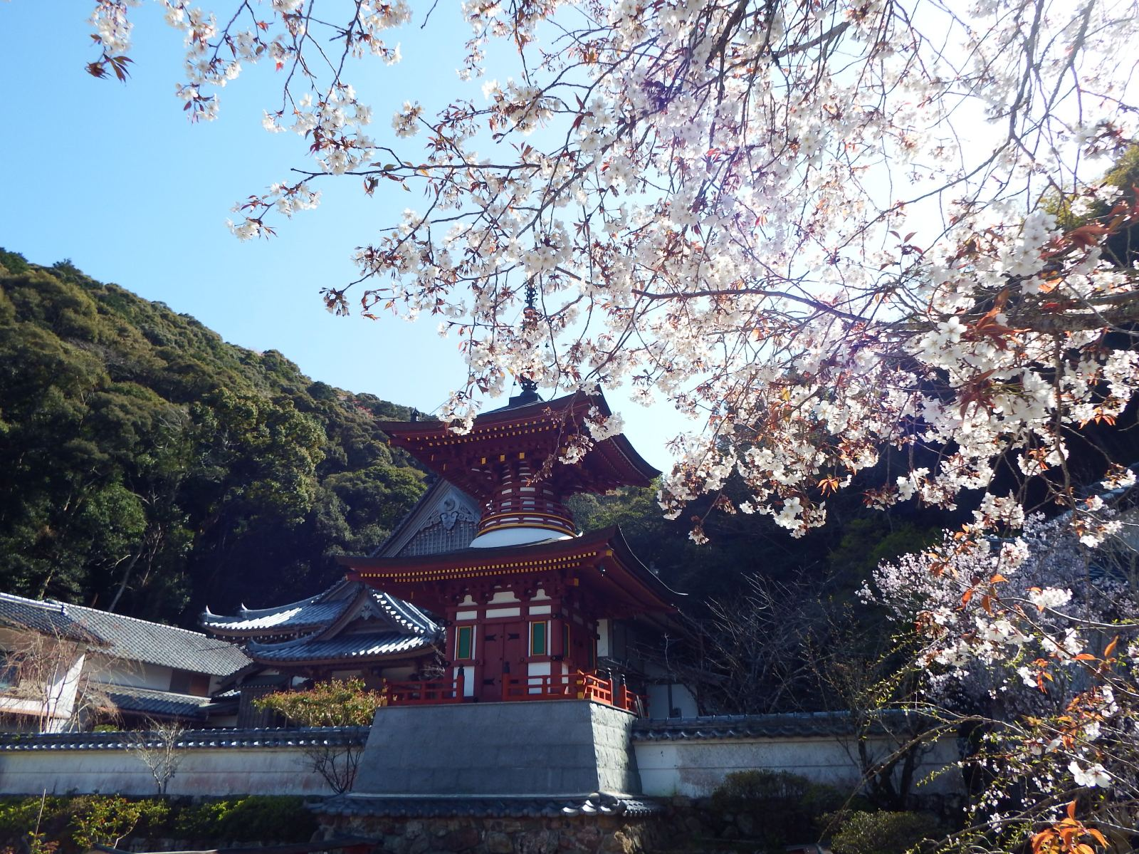 青龍寺 (土佐市）の多宝塔